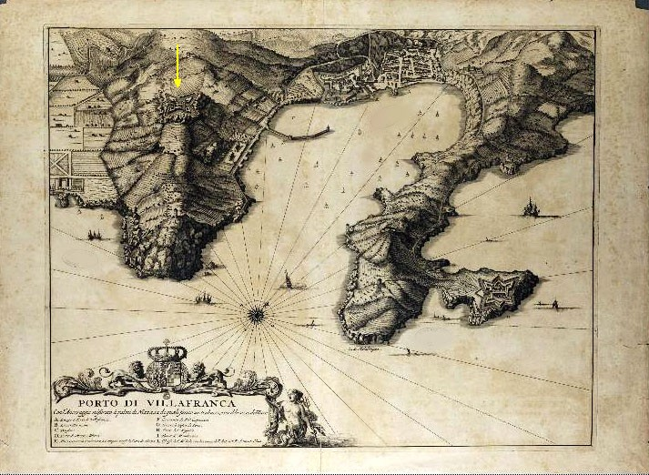 Représentation du Port de Villefranche et de ses environs ; indication des profondeurs d'ancrage ; rose des vents ; bateaux et bataille navale ; cartouche avec armoiries du royaume de Piémont-Sardaigne surmontées d'une couronne et tenues entre deux lions ; décoration ; sirène portant trident ; attributs géographiques et représentations de cultures ; porte le n° 58 ; en italien Vue perspective. La flèche jaune indique l'emplacement du Fort du Mont Alban.